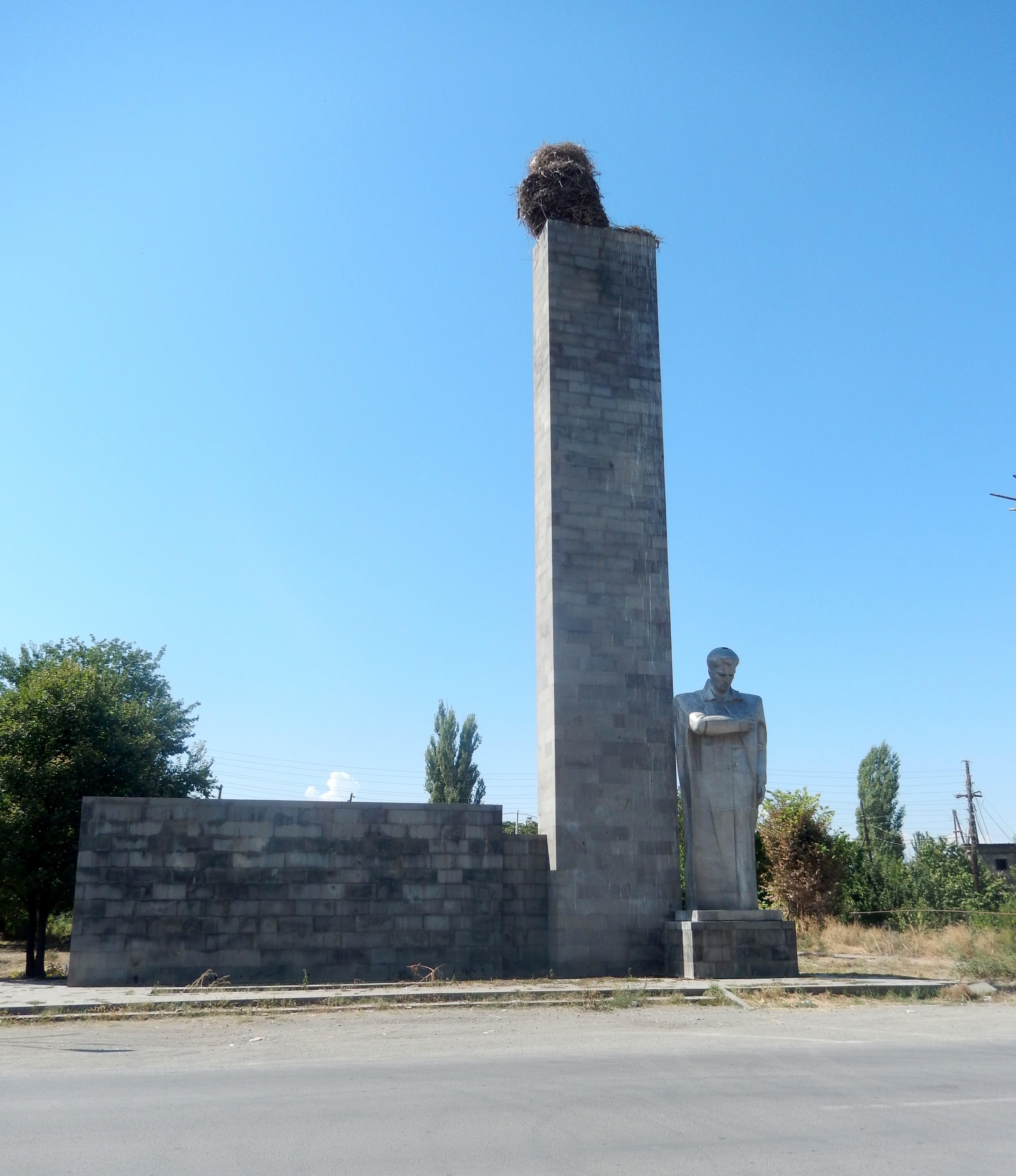 Հուշարձան Երկրորդ աշխարհամարտում զոհվածների, Արմավիր գյուղ 20/2